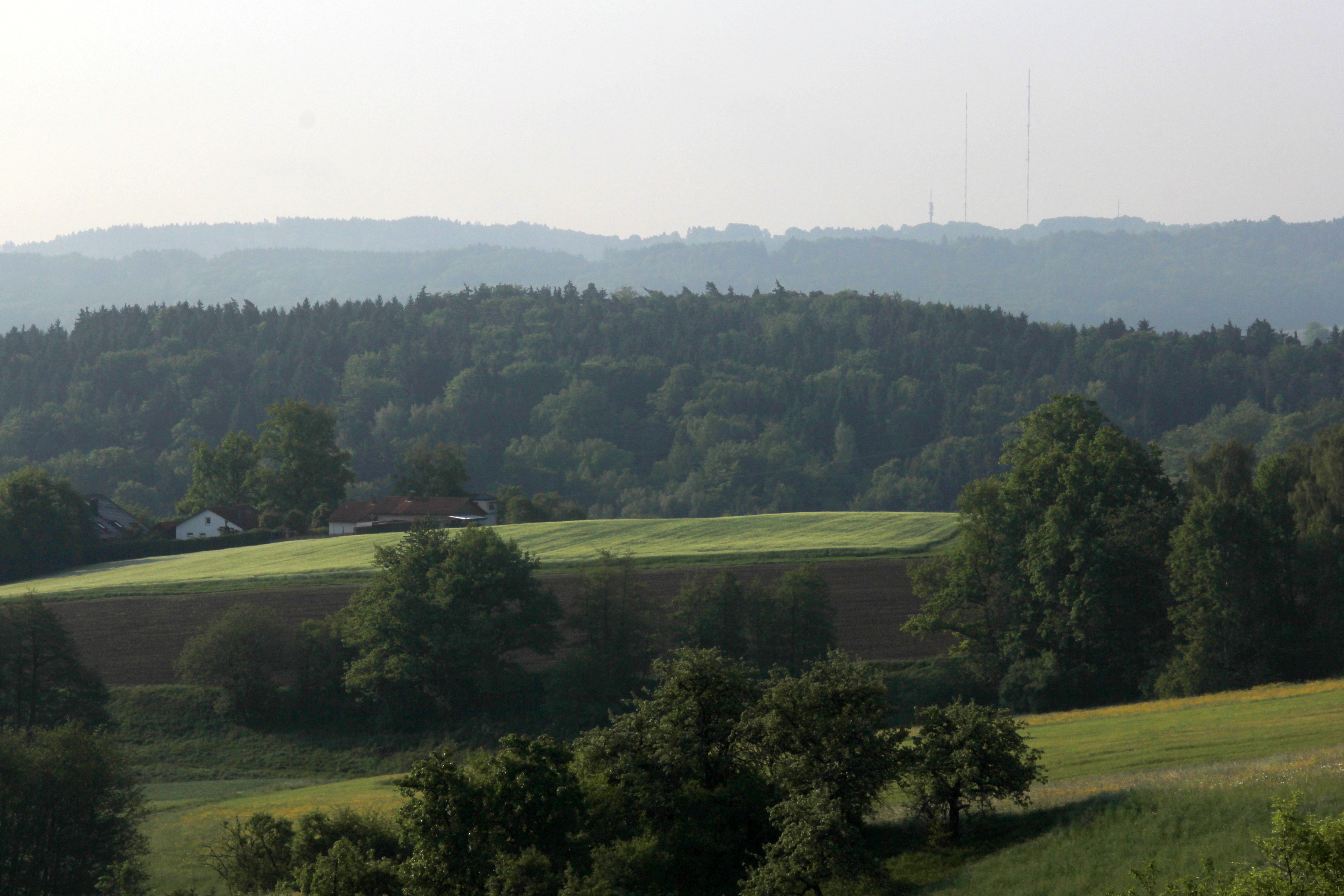 Dillberg, Blick von Altdorf